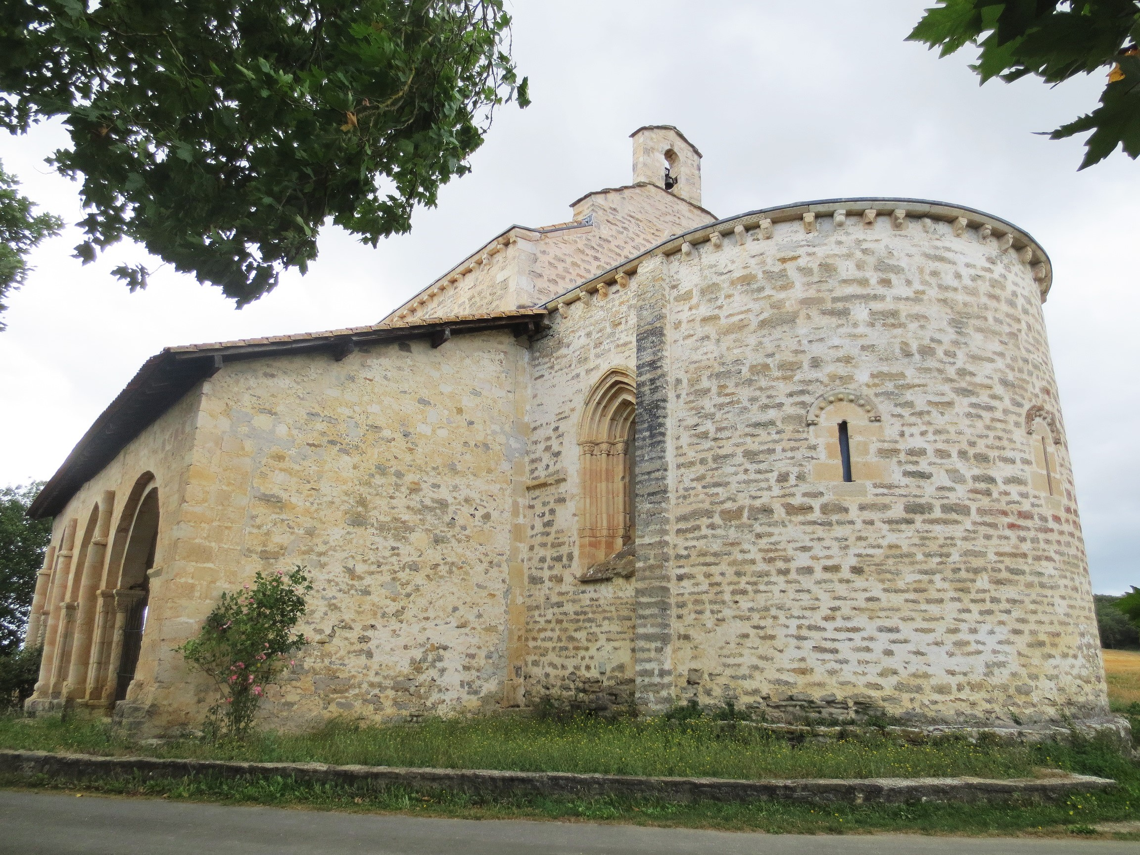 Donejakue bidea Araban